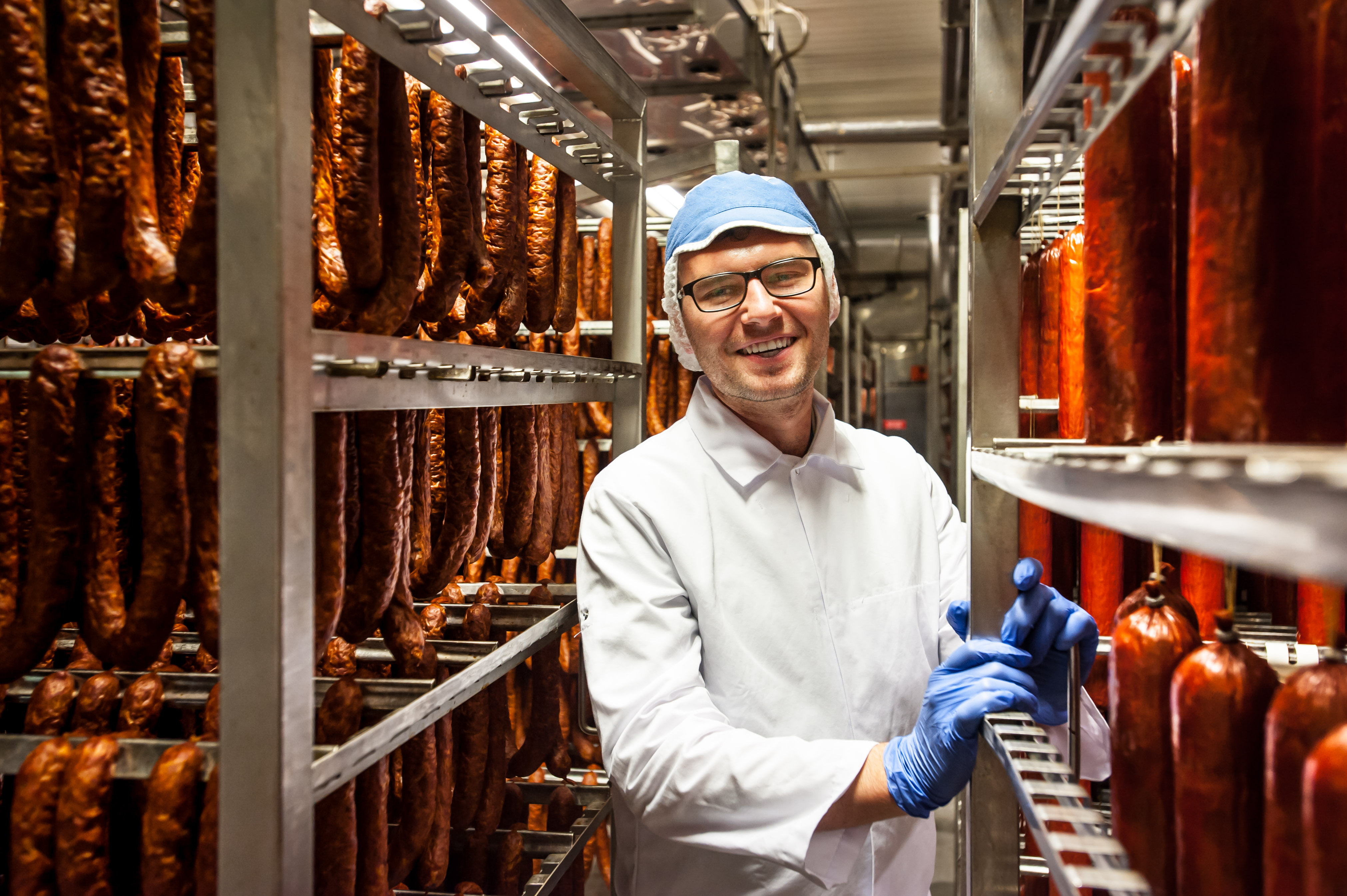 Sokołów SA Robakowo, Jakub Młynek, Filip Śleziona